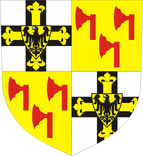 Teutonic Order - Coat of Arms of the Grandmaster Wappen des Hochmeisters des Deutschen Ordens Konrad Zöllner von Rotenstein